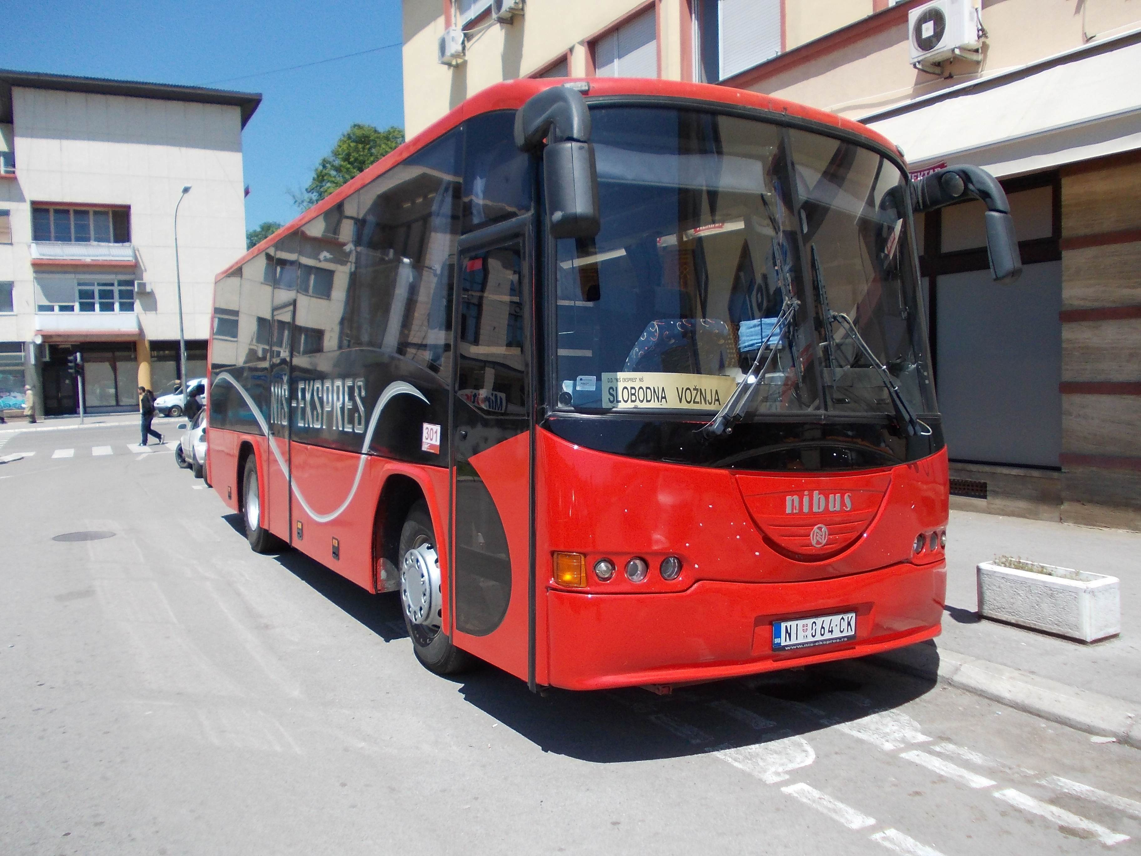 Nibus g.b 301 u Banjaluci